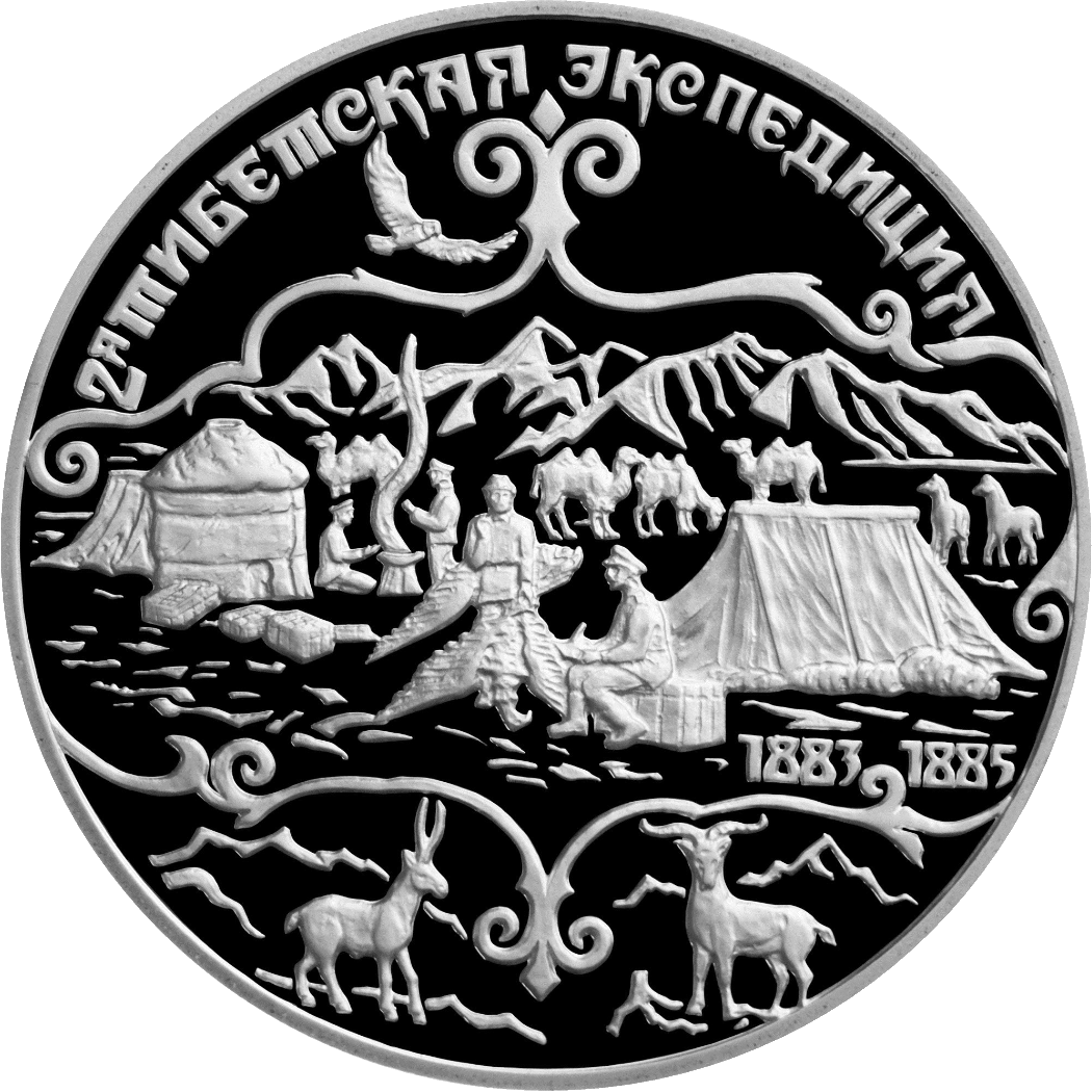 Монета Банка России — «Географическая серия», Русские исследователи Центральной Азии, Н.М. Пржевальский, 2-я Тибетская экспедиция, 3 рубля, реверс